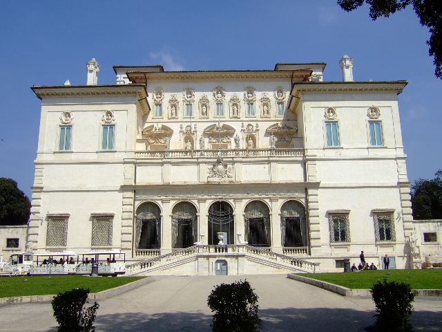 Casino der Villa Borghese - April 2009